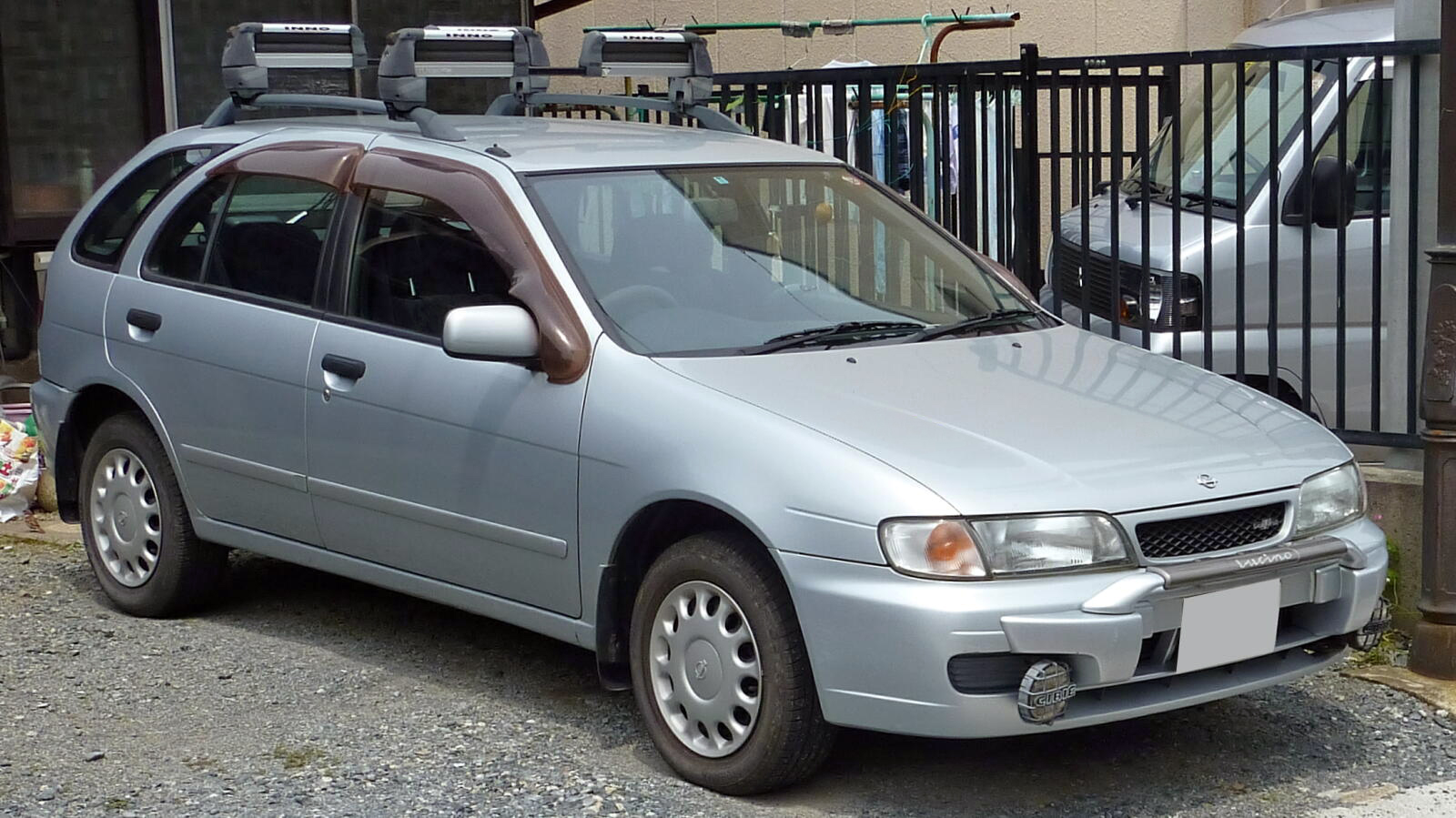 日産・ルキノS-RV